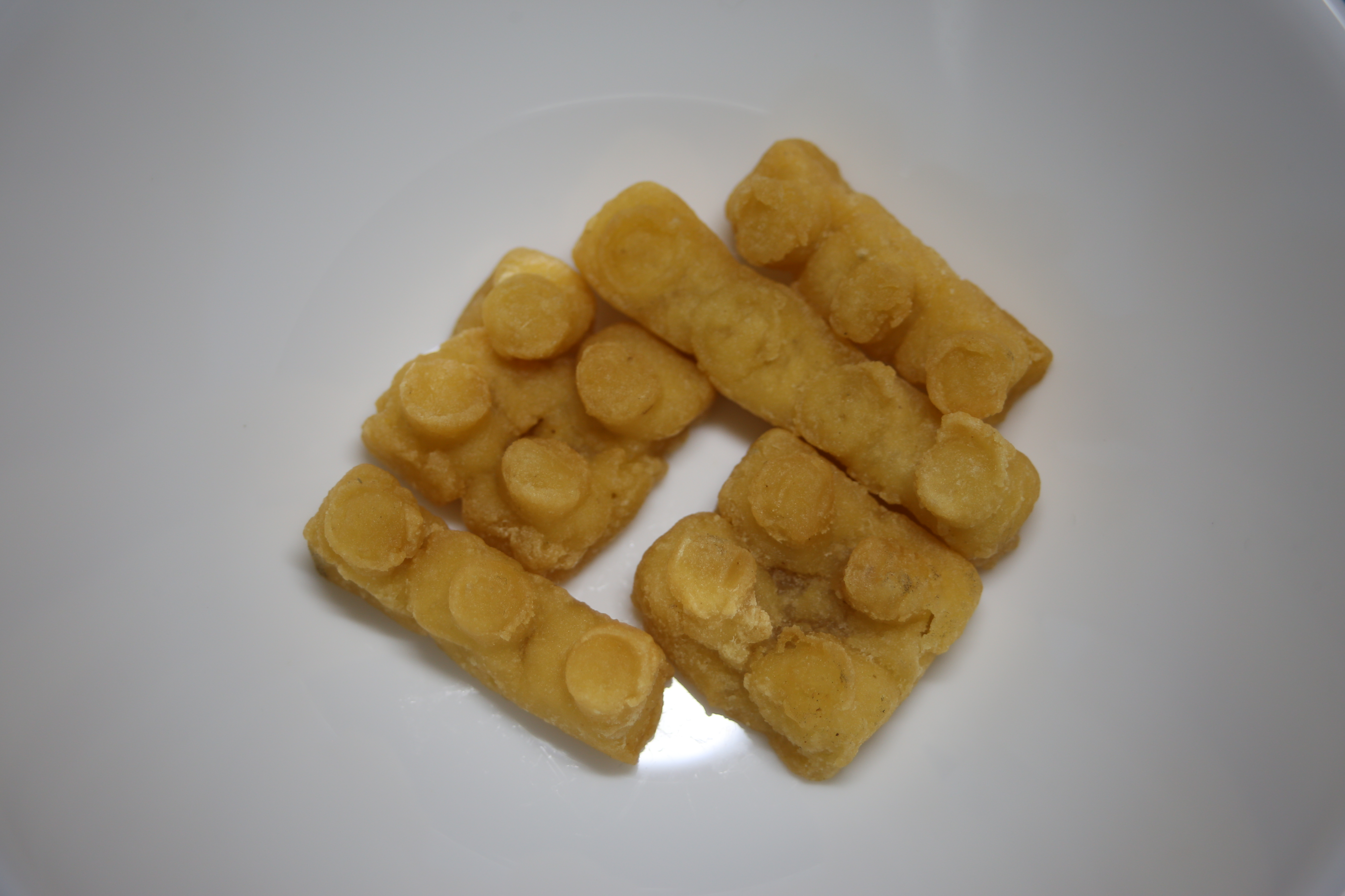 名古屋市港区金城ふ頭のレゴランド・ジャパンにおいて販売されている「レゴポテト」のうち、5つだけ抽出して撮影したもの。